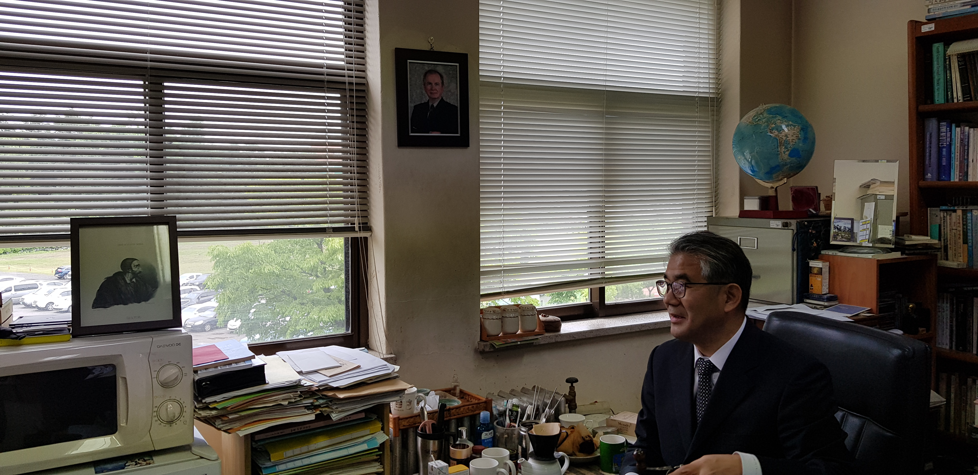 합동신학대학원 대학교 김추성 박사, 2018년 5월 17일 연구실에서